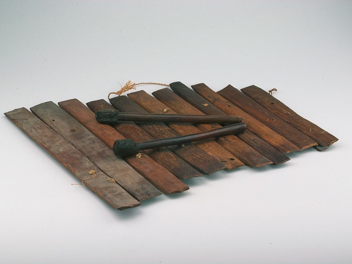 Van deze xylofoon met 11 toetsen (lamellen) zijn alleen de toetsen nog over; het onderstel, de isolatiekussentjes en de bamboe-klankbuizen onder de toetsen zijn verdwenen.